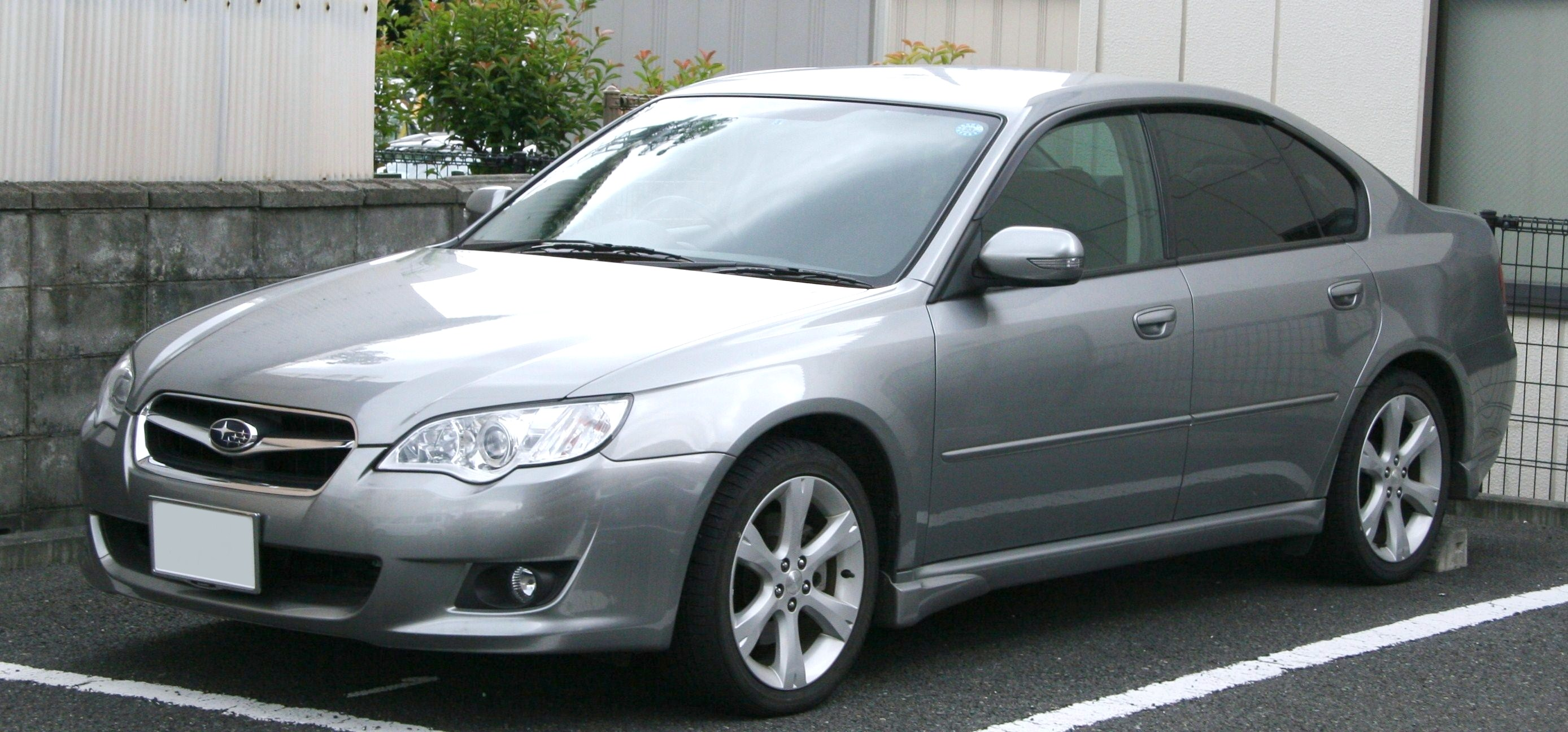 Subaru Legacy B4